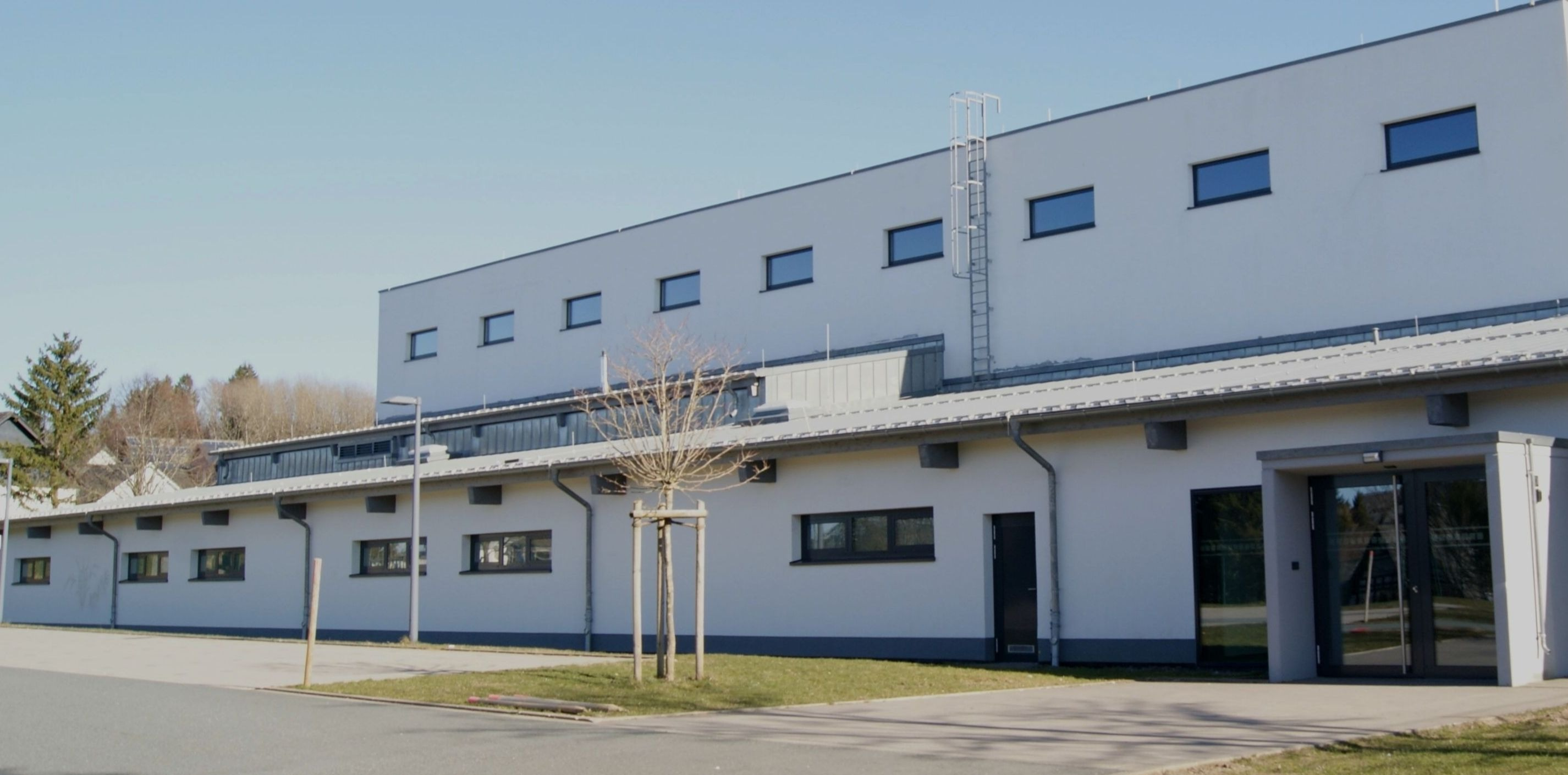 Bild von der Eingangsseite der Dreifach-Turnhalle